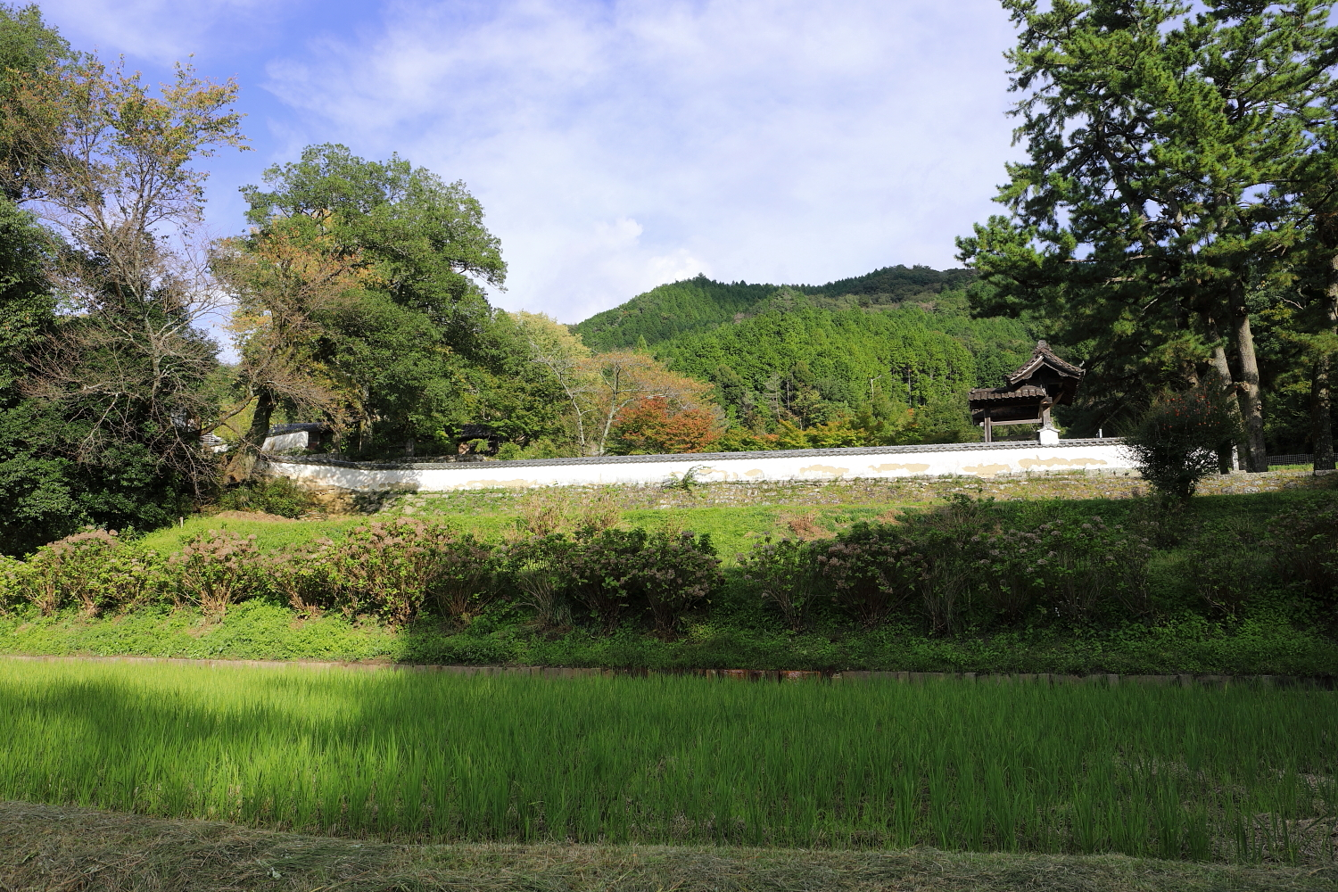 高月院 - 参道遠景（豊田市松平町、2019年（令和元年）10月）